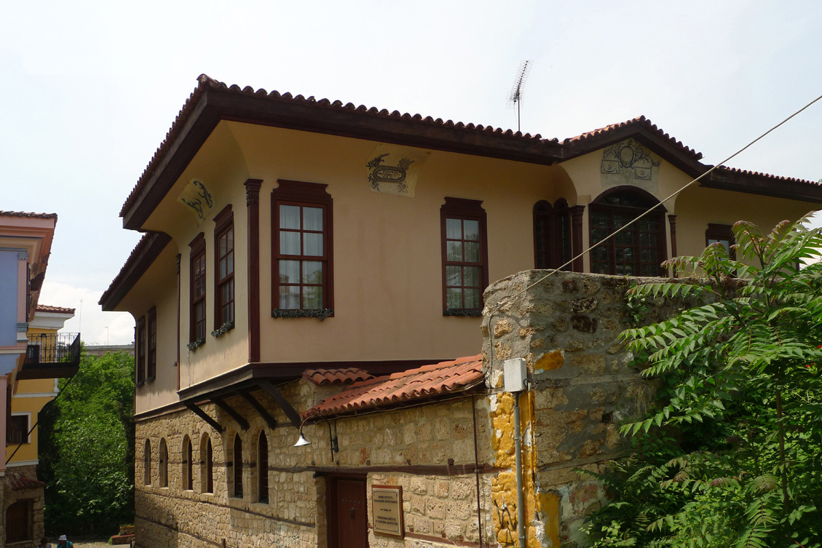 The Rabbi's house in the former Jewish quarter of Veria